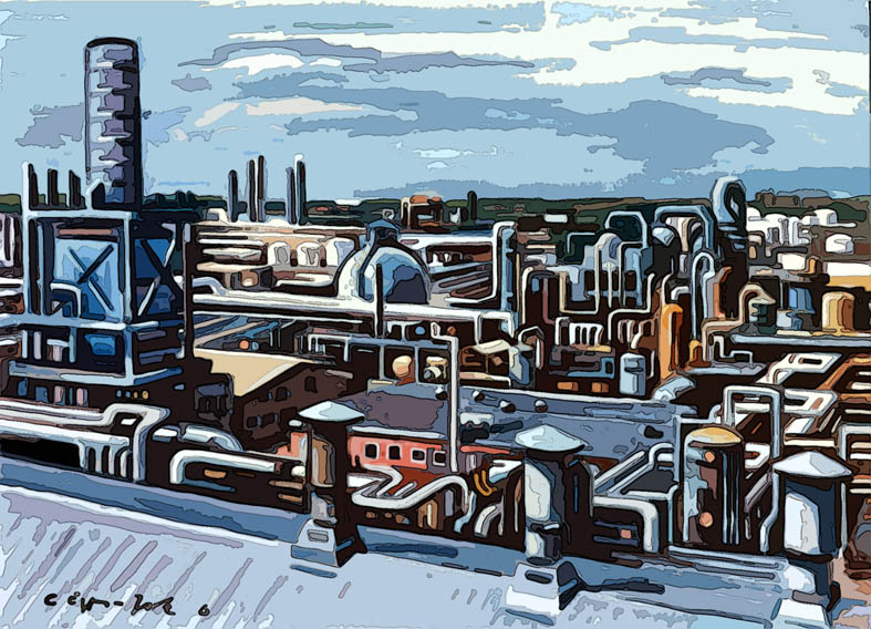 Industrie-Landschaft Dow Chemical Deutschland, 1,10 x 1,90, Ölgemälde von Carsten Eggers